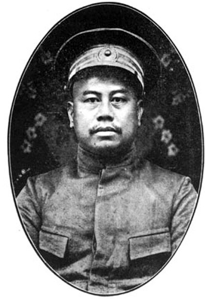 竜済光 (1866 - 1925)